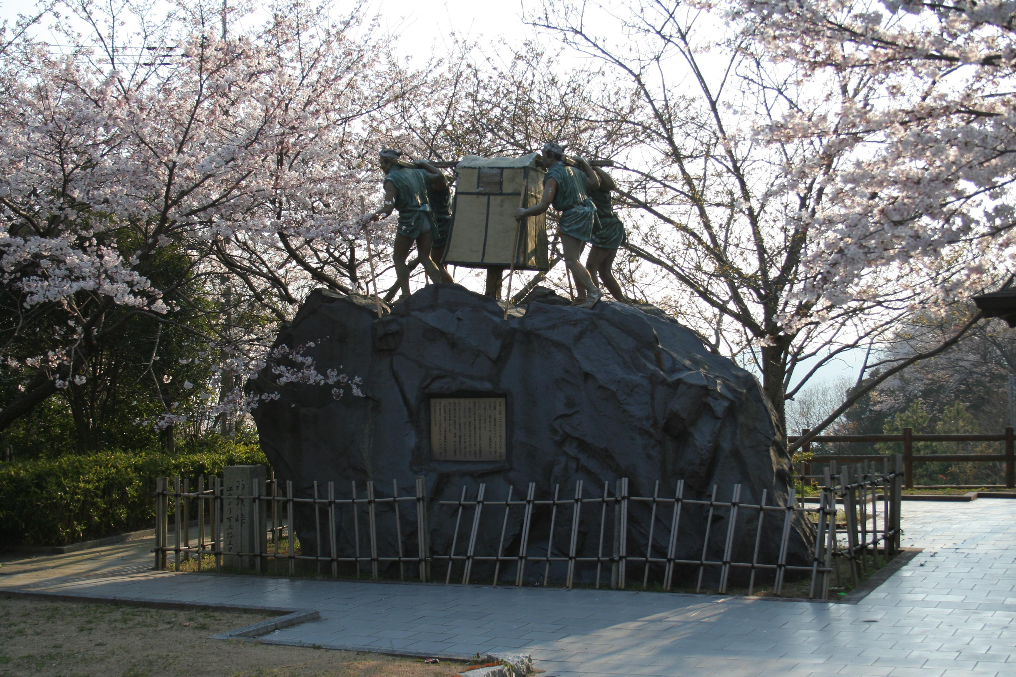 高取峠。頂上付近にある早籠の像。江戸時代に赤穂藩主が江戸城内にて刀傷事件を起こした際に、それを赤穂へ伝えるために利用された早籠がモデルになっている。